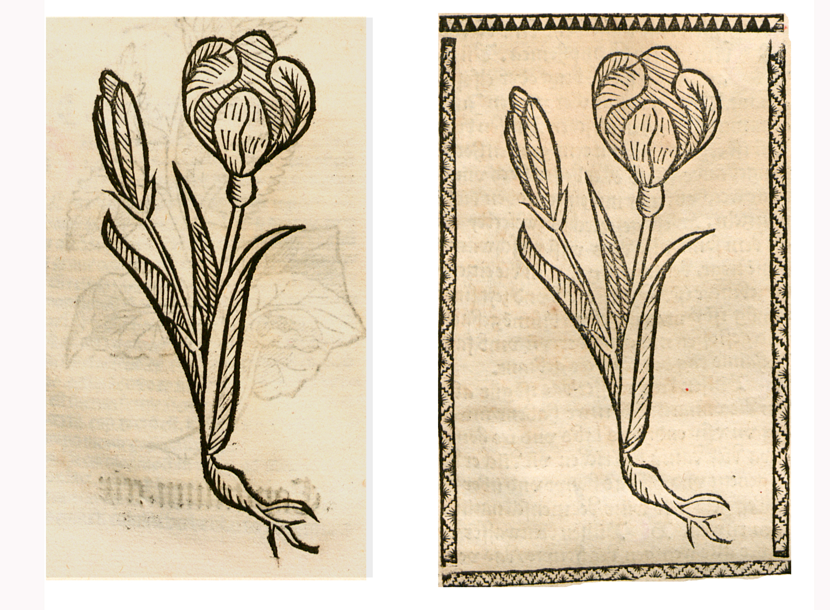 Abbildung von: Blaue Lilien